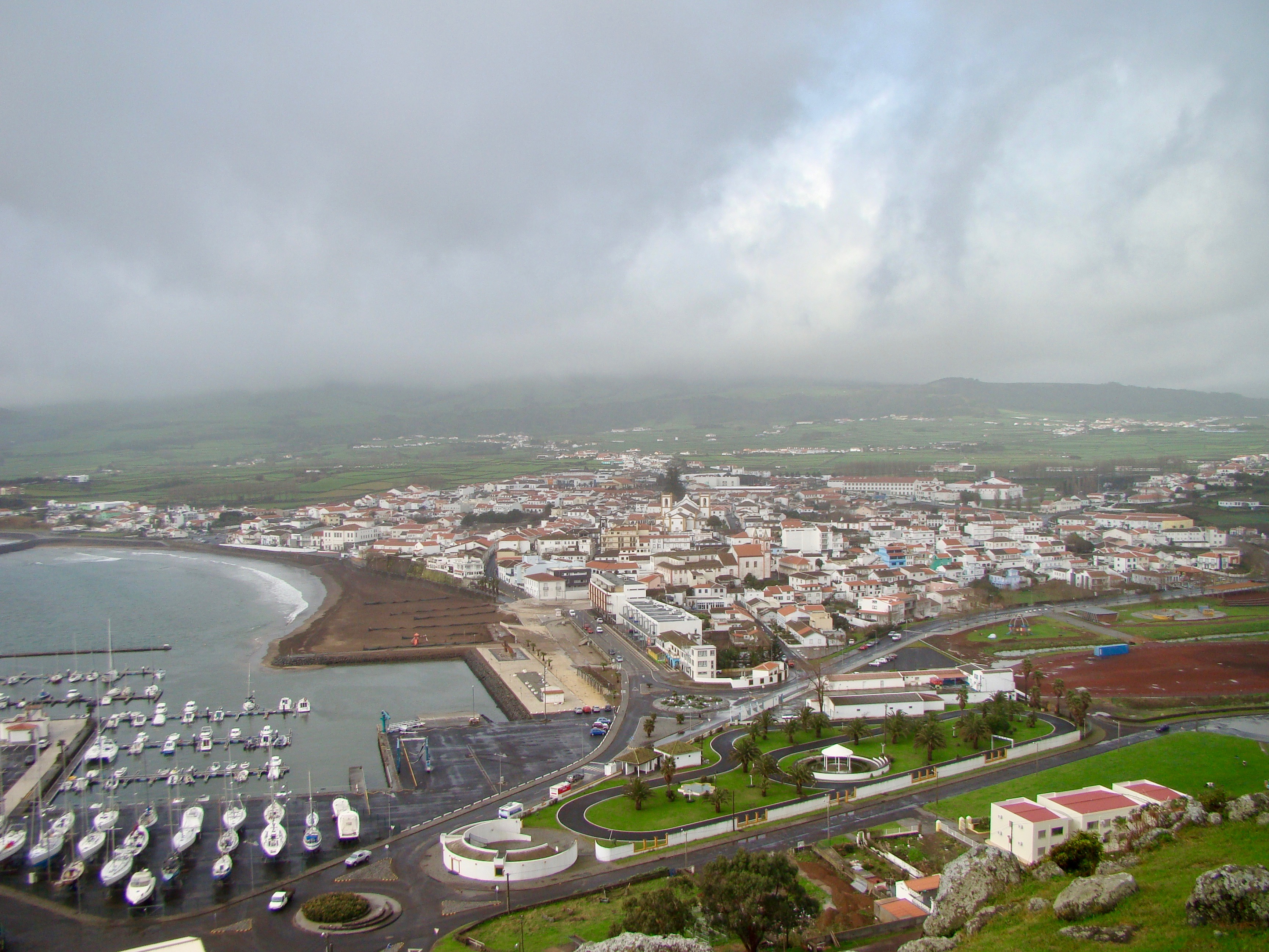 Vista da baía da Praia da Vitória, ilha Terceira, Açores. Foto tirada a 14/02/2010.